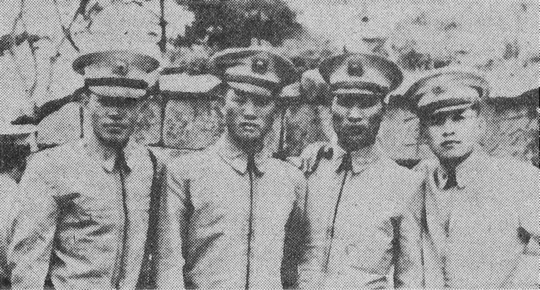 전두환의 육군사관학교 생도 시절 사진